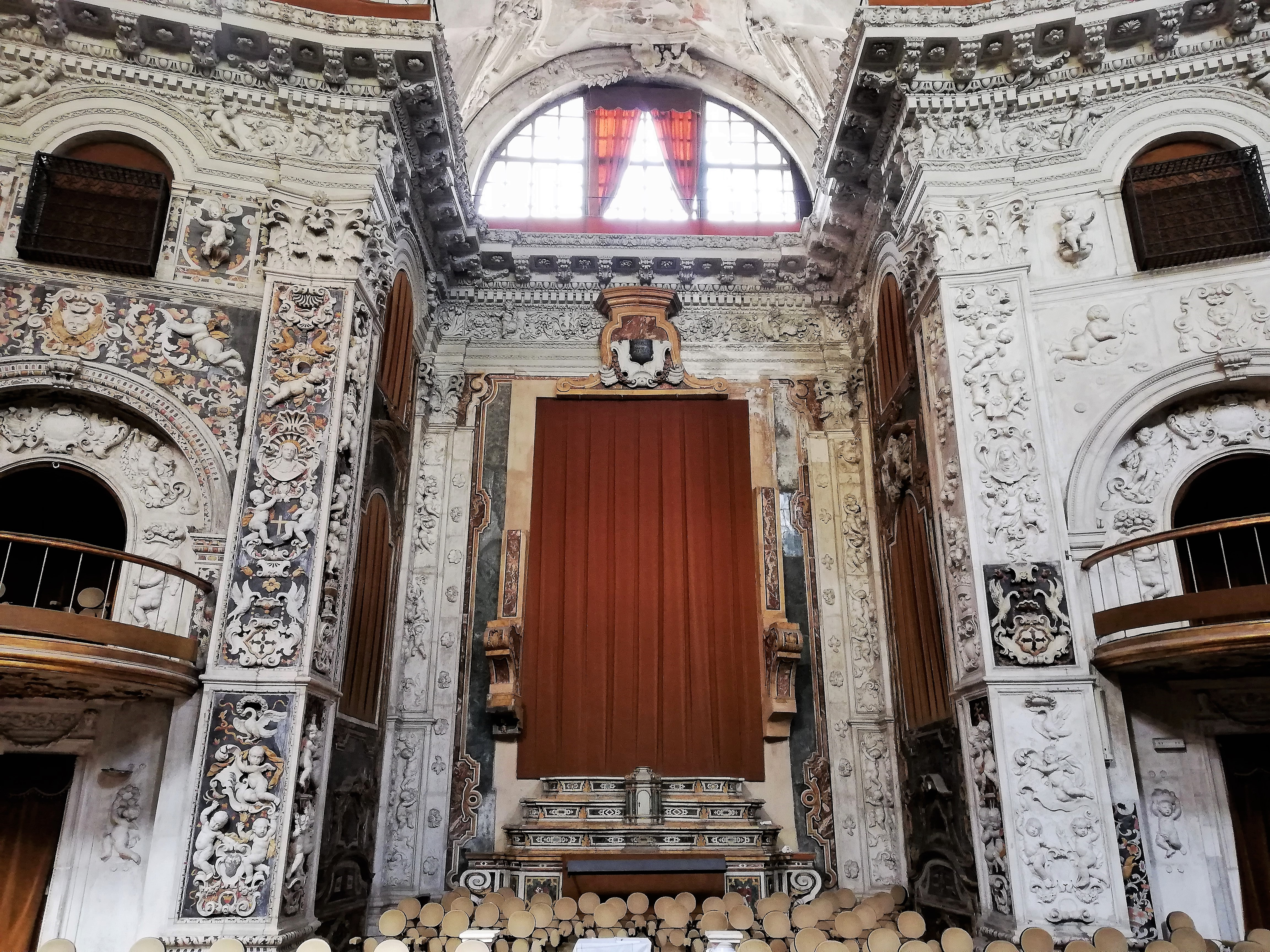 Quadrone di levante.